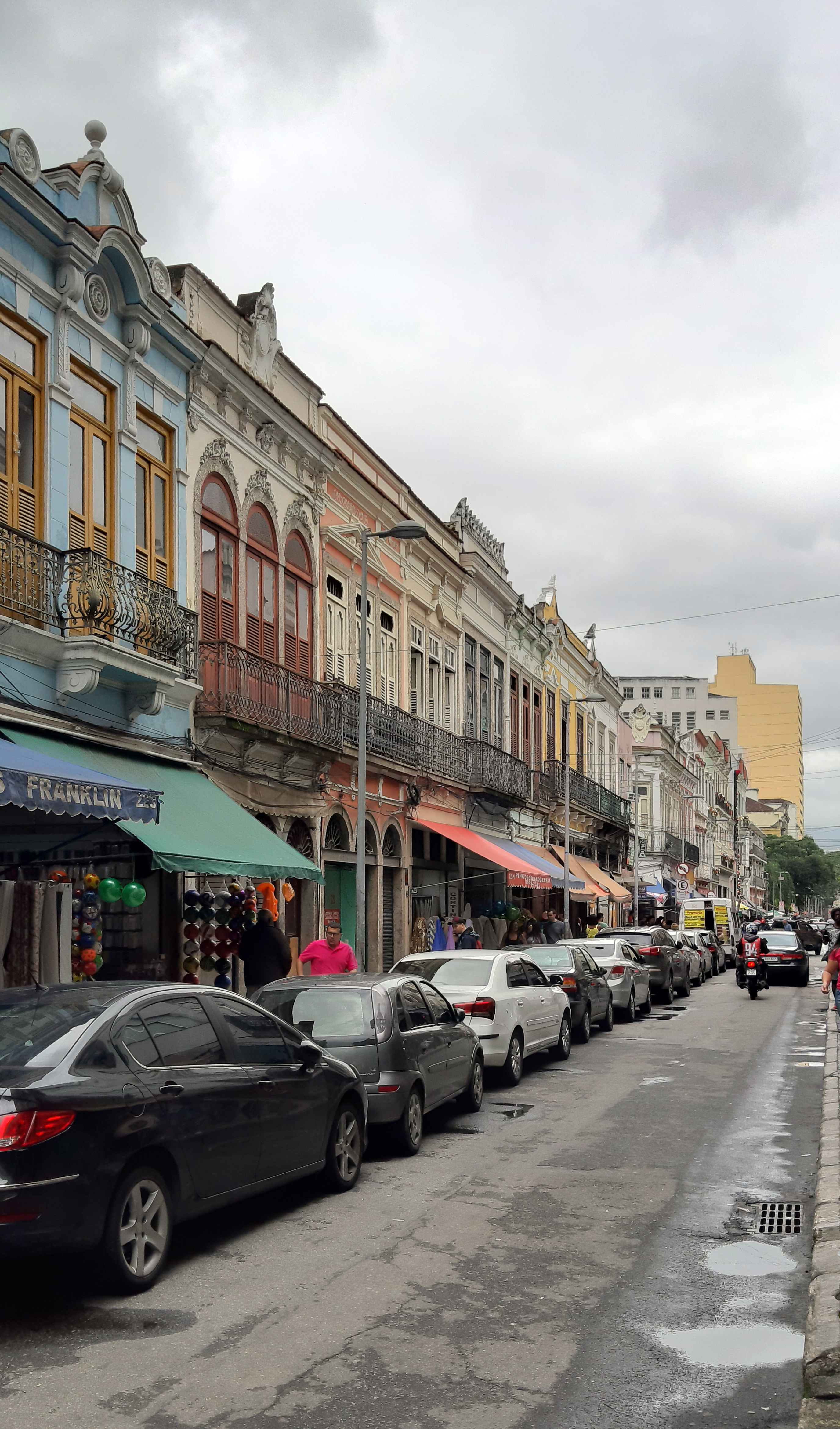 Sobrados do lado impar da Rua Buenos Aires entre a Avenida Passos e a Praça da República.